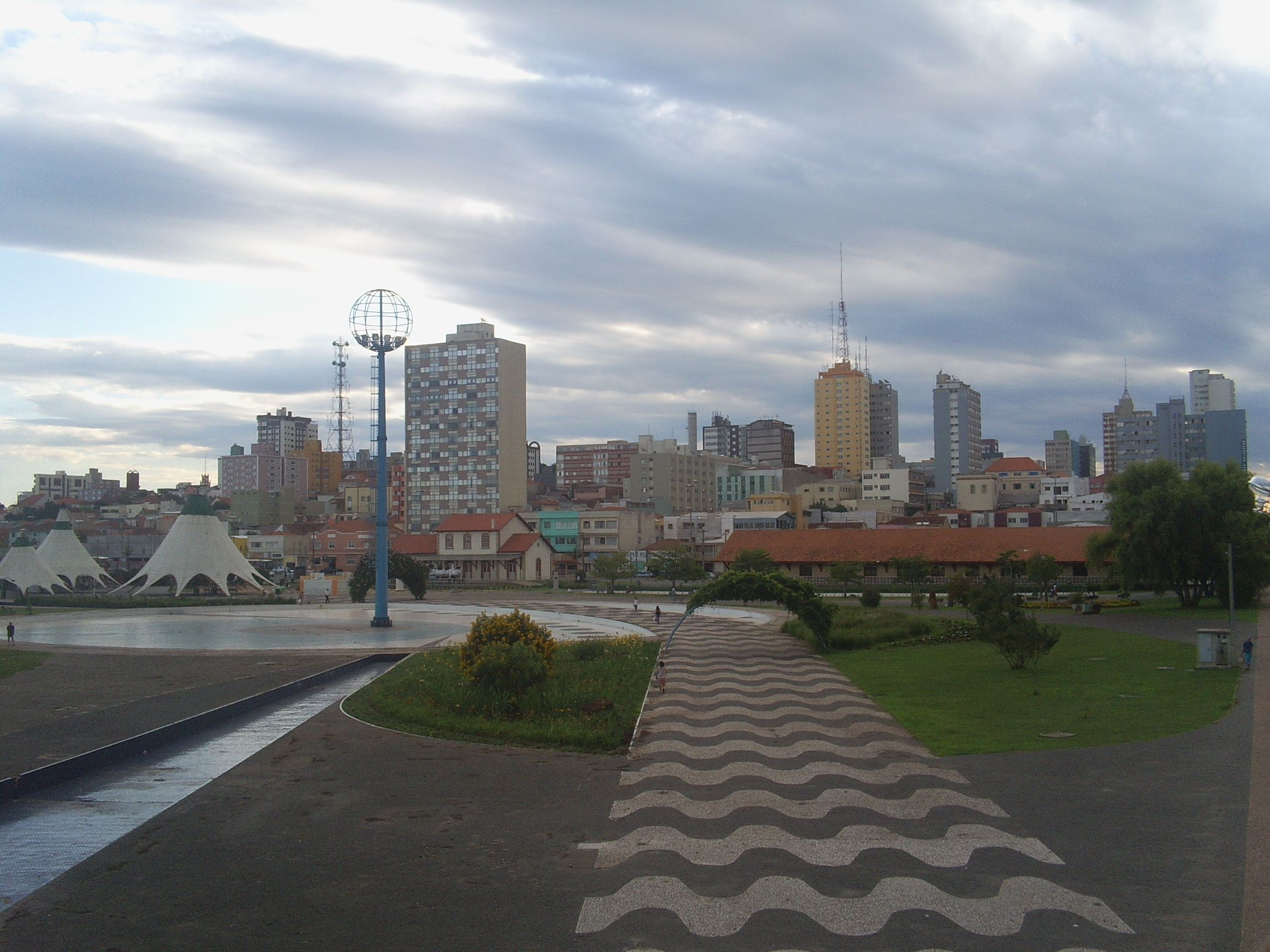 Ponta Grossa, Brazil